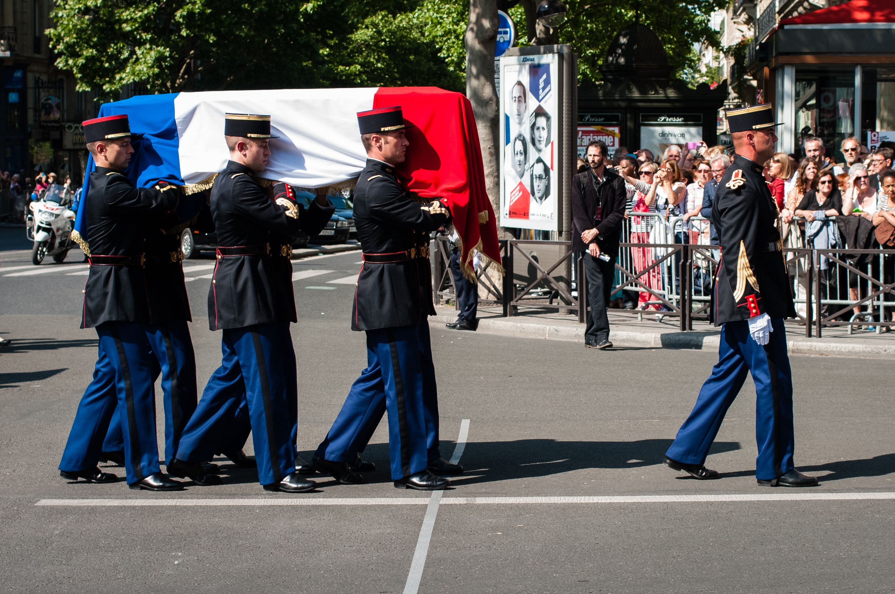 Germaine Tillion, Geneviève de Gaulle-Anthonioz, Pierre Brossolette et Jean Zay rentrent au Panthéon - Paris - 27 mai 2015.